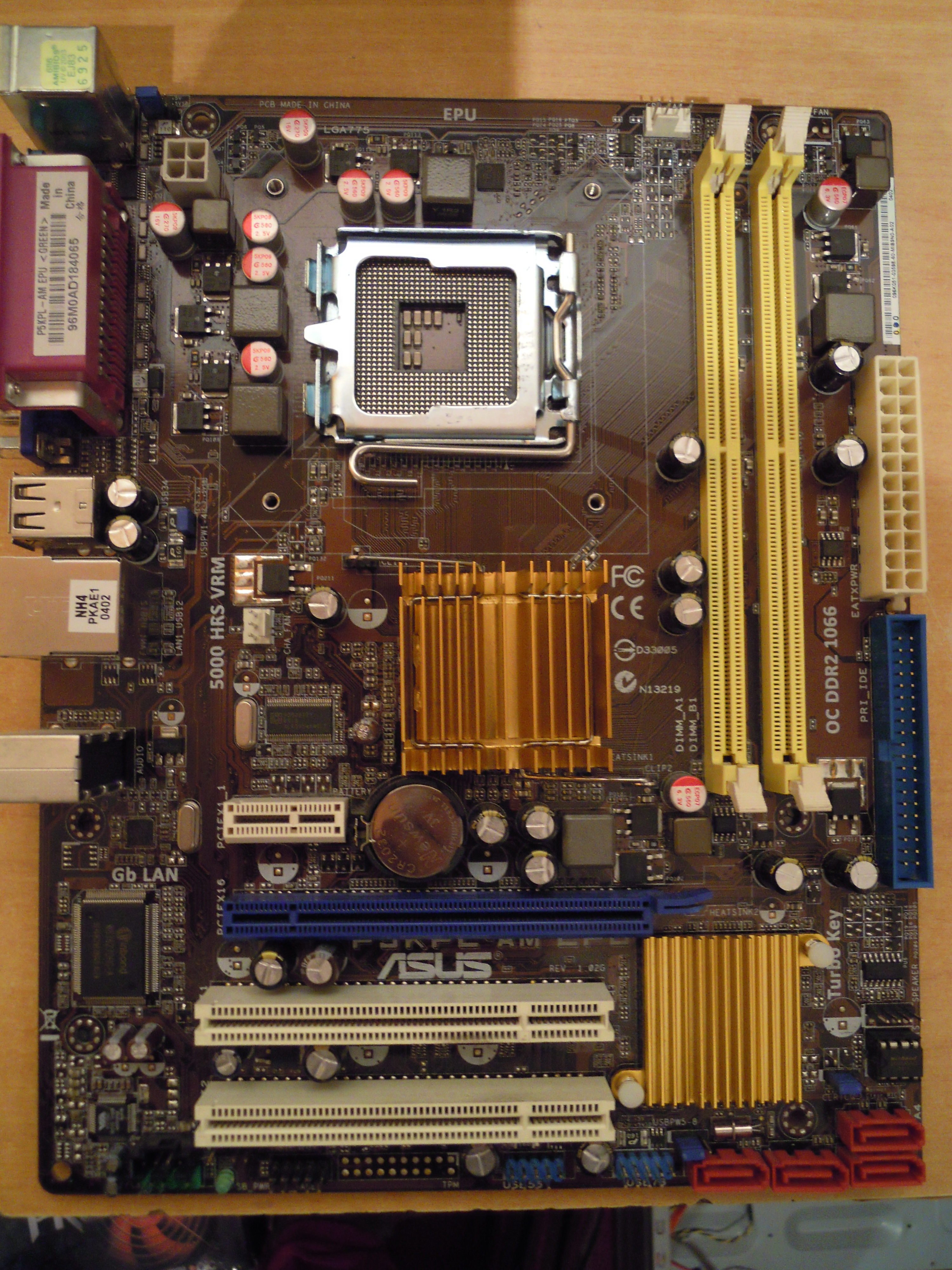 Placa Base MiATX